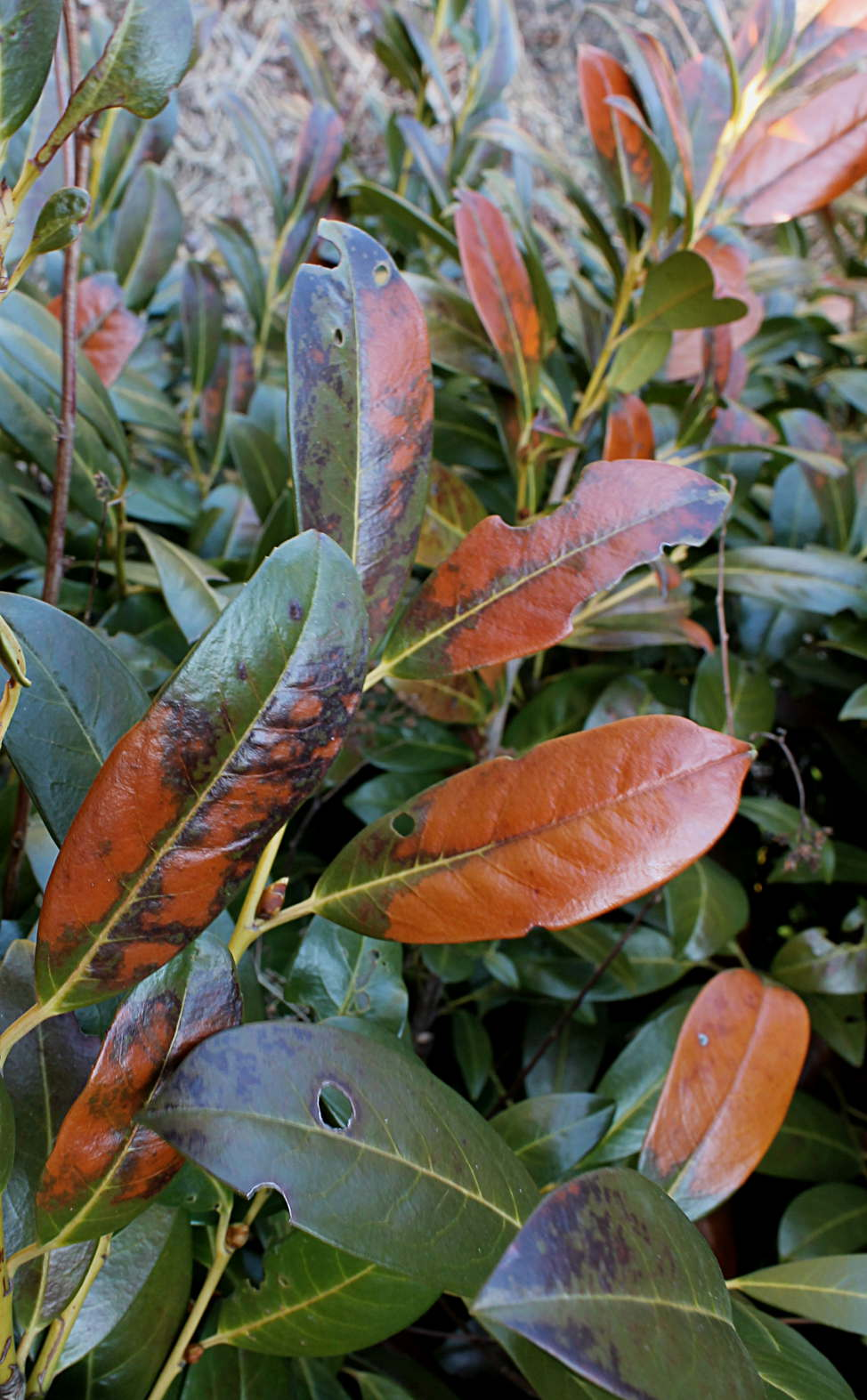 Prunus laurocerasus, poškození mrazem